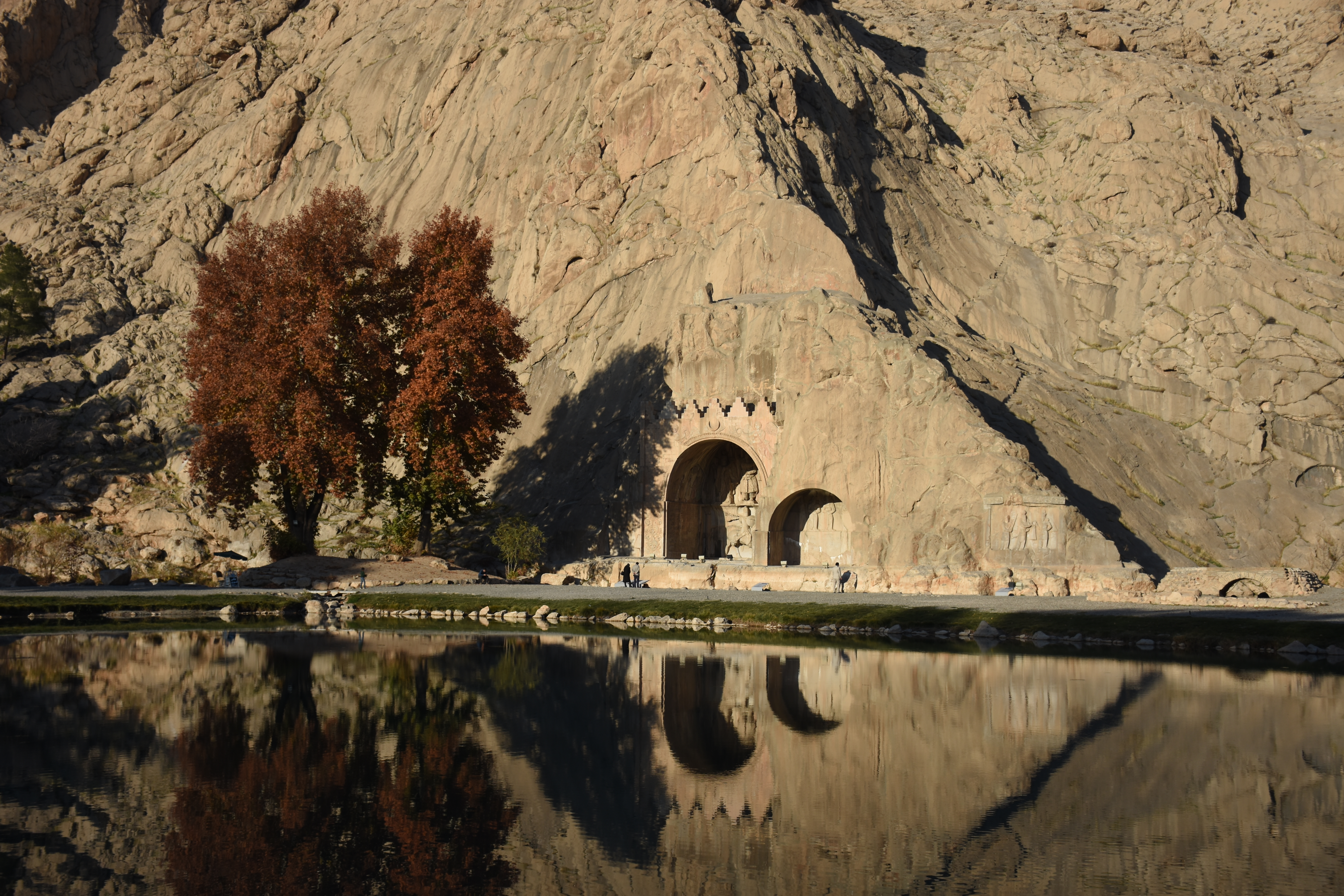 تاق‌بستان، ایران، استان کرمانشاه، شهرستان کرمانشاه، عکاس علی حیدری